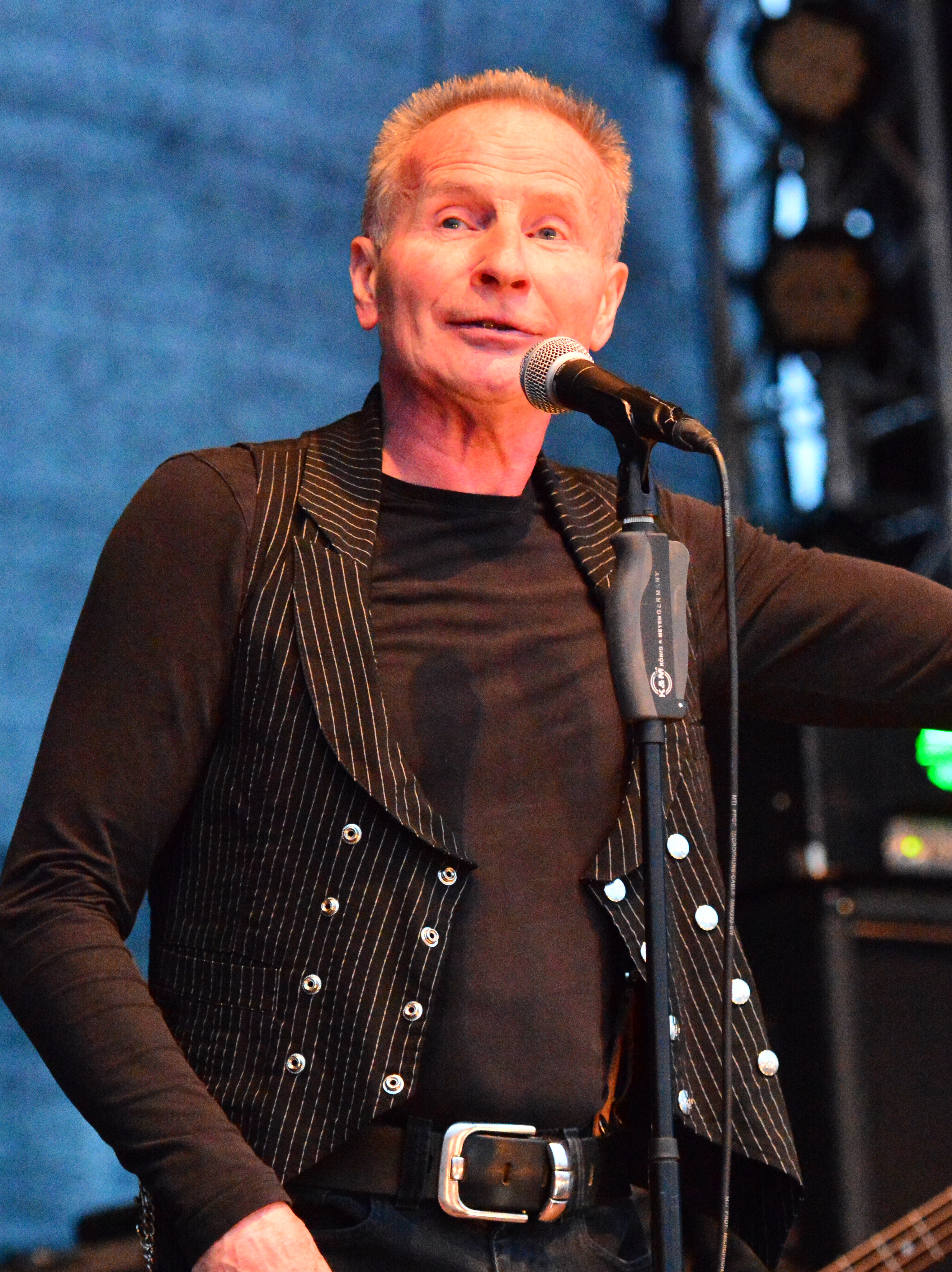 Phil Mogg von UFO bei den „Hamburg Harley Days“